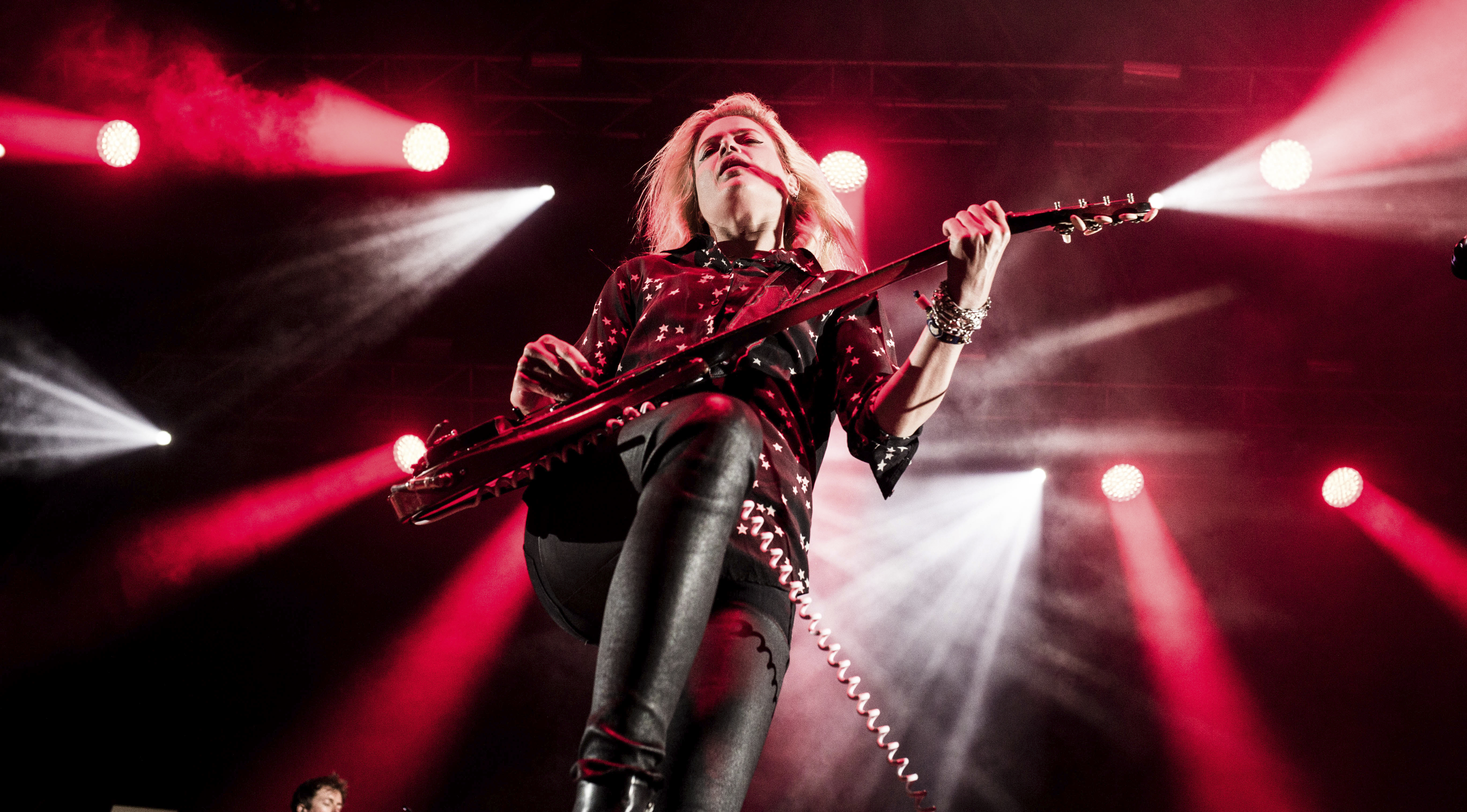 FIB 2016